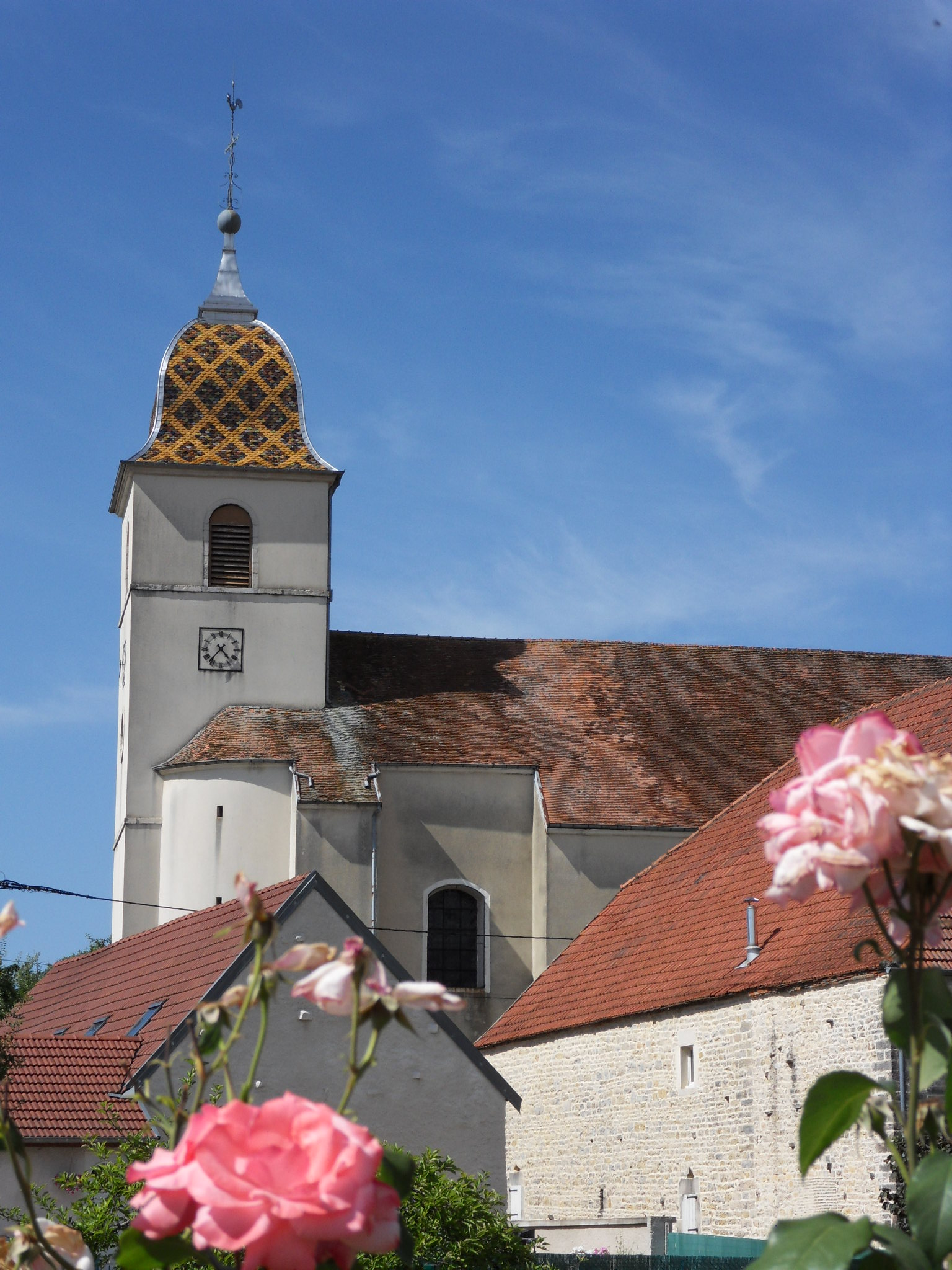 Champagney (Jura) Champagney (Jura) Département du Jura, Franche-Comté, FRANCE